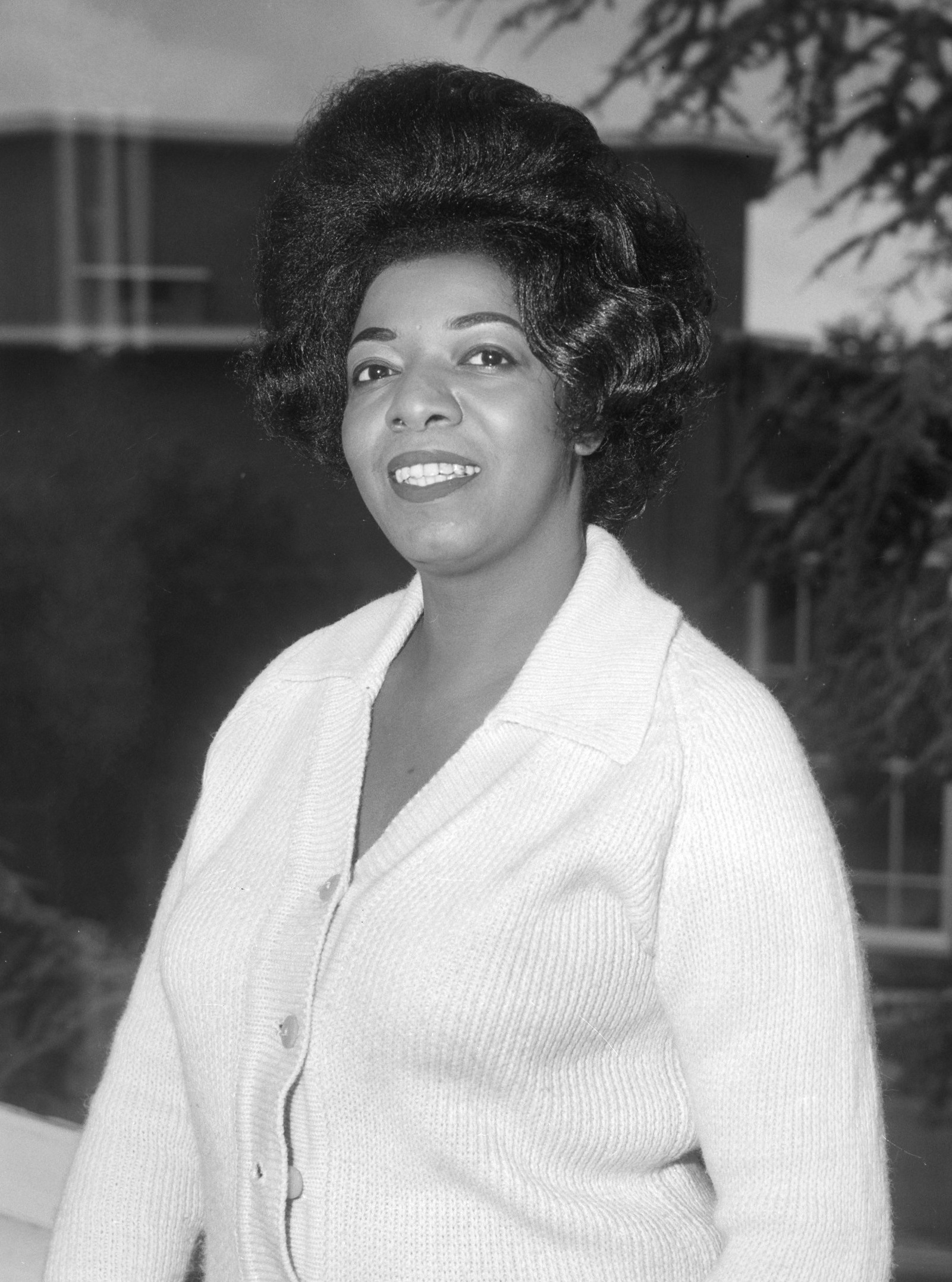 Dakota Staton (Amerikaanse zangeres) zal optreden voor AVRO televisie, Dakota Station